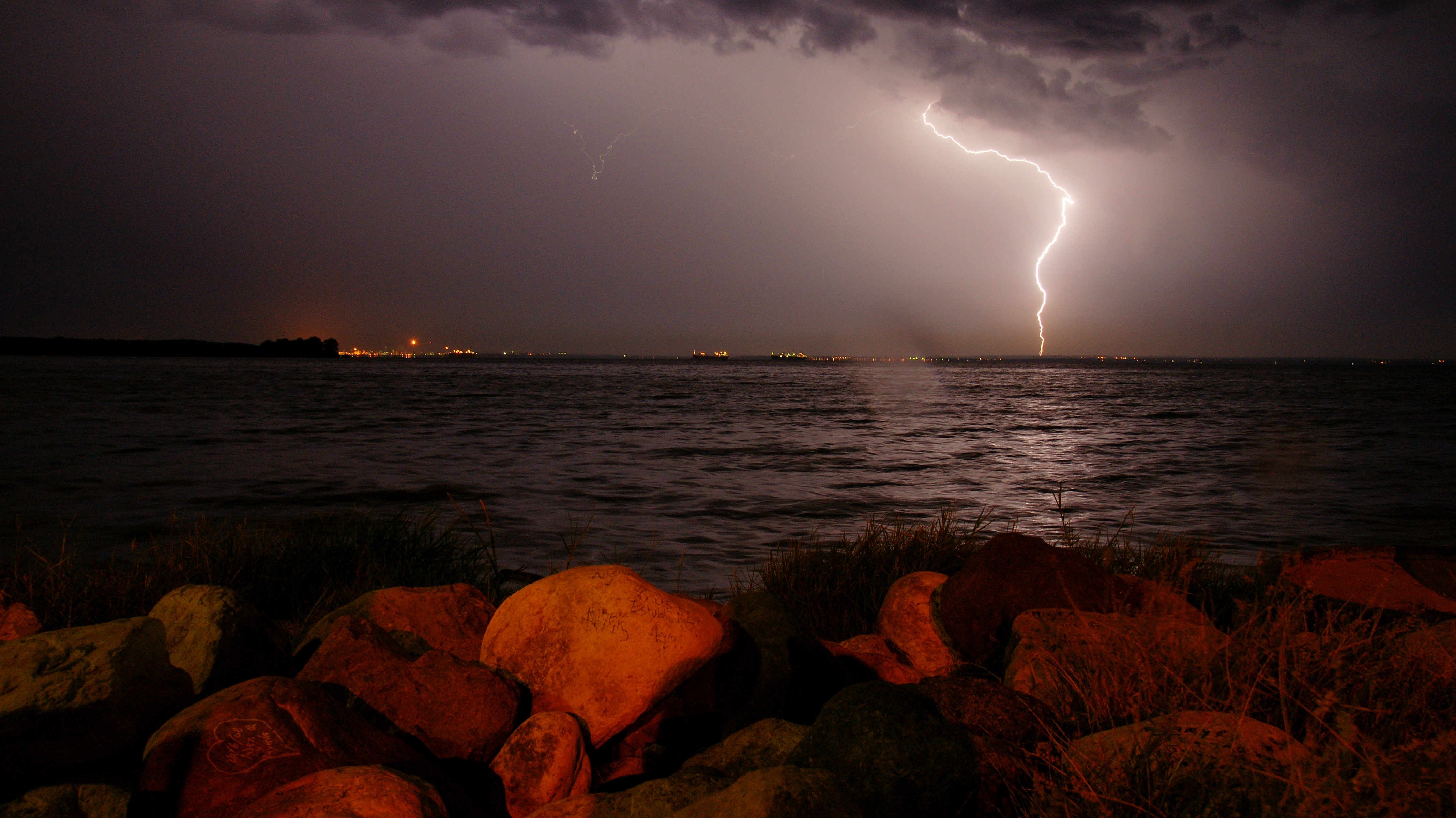 tormenta eléctrica lago de Maracaibo